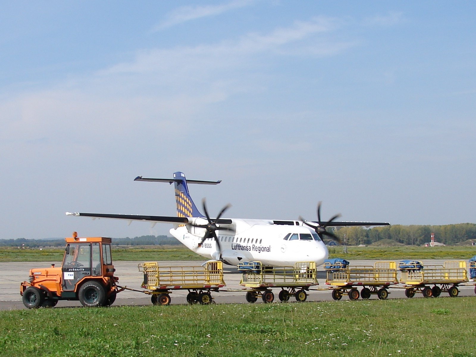 ATR 42-500 (D-BSSS) der Contact Air (Lufthansa Regional) auf dem Flughafen Altenburg-Nobitz